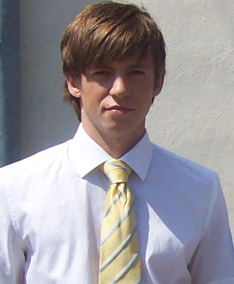 Piotr Ligienza - polski aktor (Plan serialu Ranczo, 4. seria).